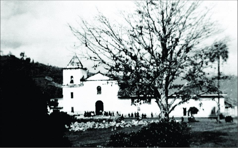 Aspecto del templo parroquial en 1929